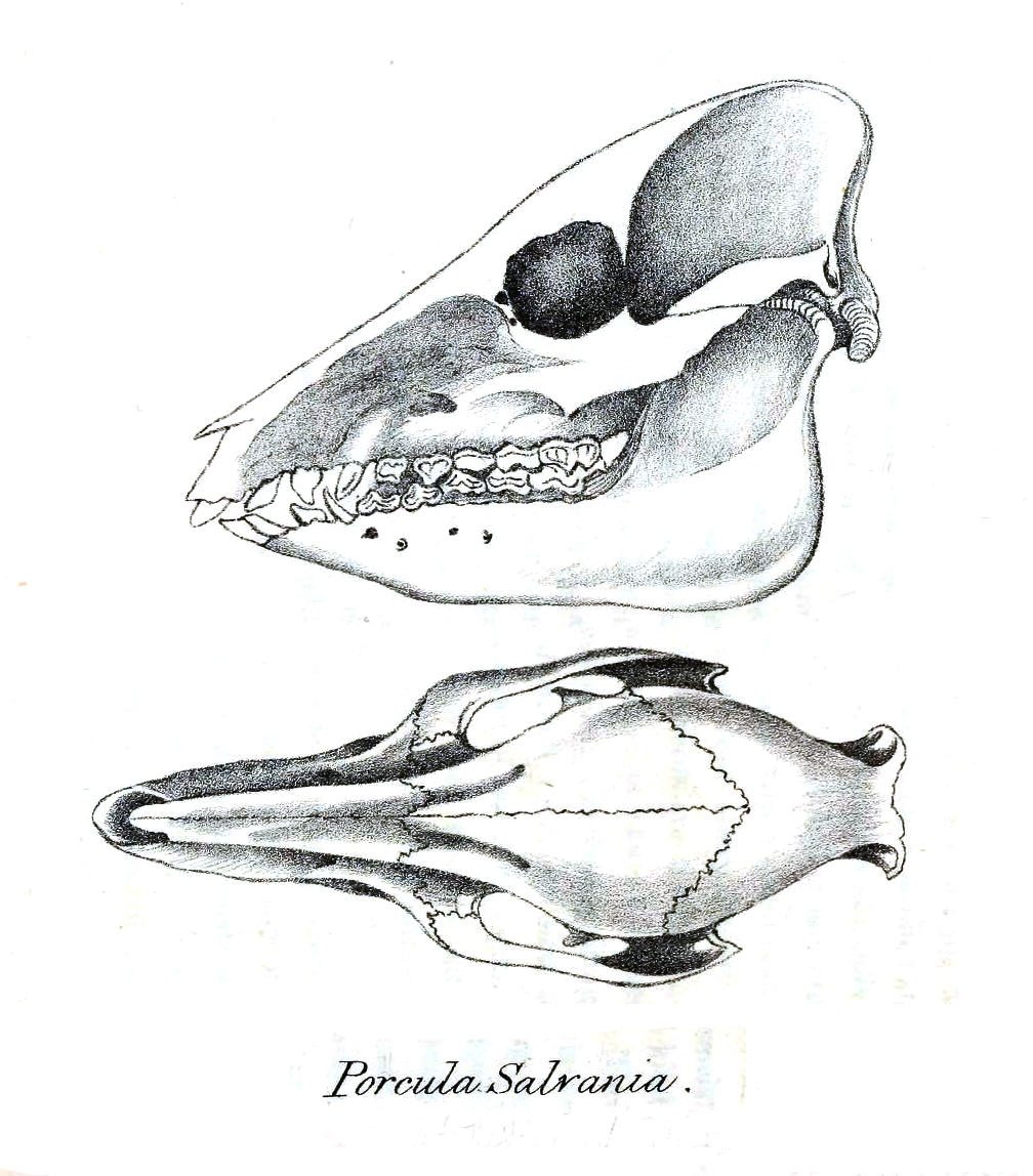 Skull of Porcula salvania